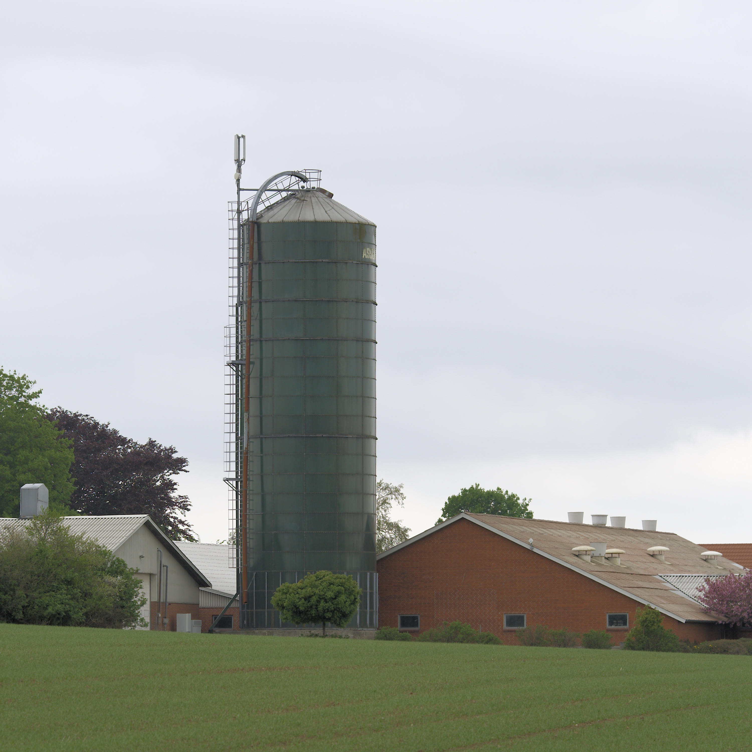 Landbrugssilo ved Borum i Aarhus kommune